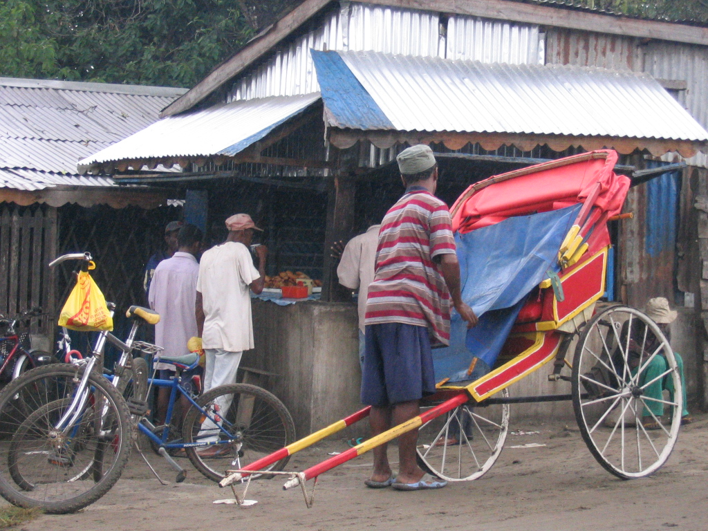 Pousse-pousse à Tamatave, Madagascar, 2006.